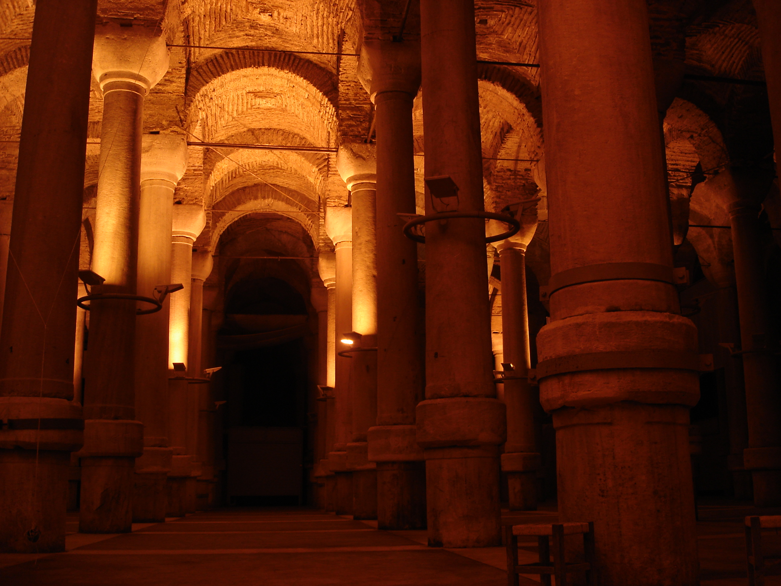 La citerne de Lausus-Birbindirek (ou de Philoxenos) à Istanbul.